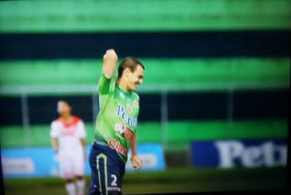 Martín Gimenez- Santa Tecla